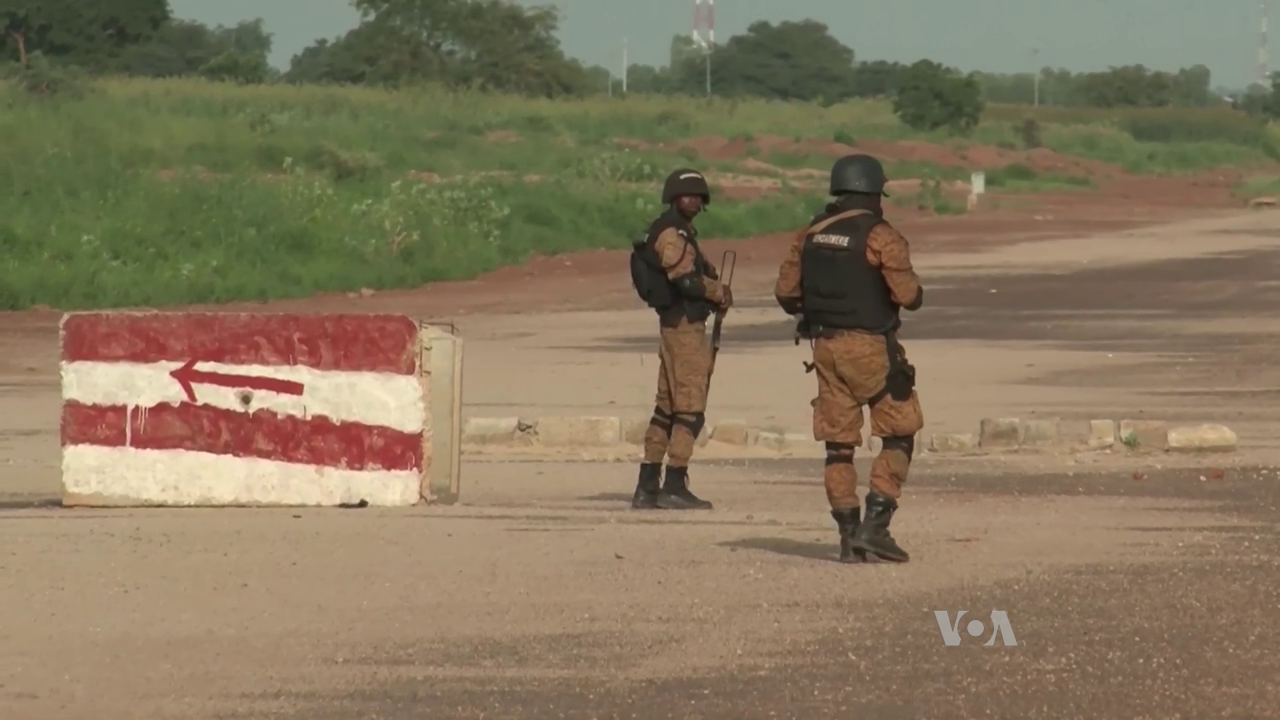 Deux gendarmes burkinabè devant le palais présidentiel, Ouagadougou, le 29 septembre 2015 (légende issue de File:Soldat burkinabè devant le palais présidentiel, Ouagadougou.jpg qui présente visiblement le même évènement).